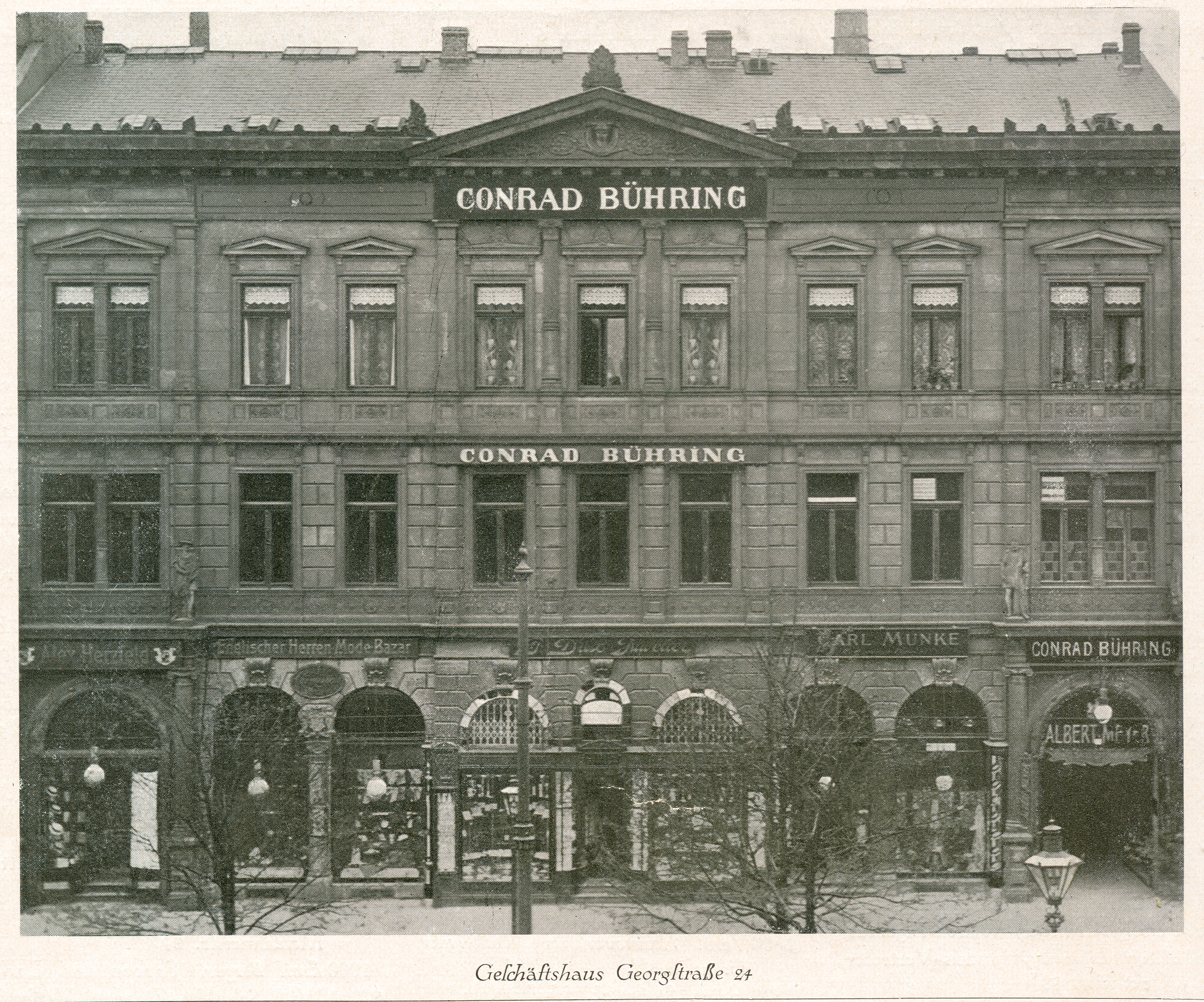 Das um 1873 bis 1874 im Stil der Neorenaissance durch den Architekten Ludwig Brockmann und die Hannoversche Baugesellschaft als Sitz der Provinzial-Disconto-Gesellschaft Hannover unter Max Jacob Frensdorff errichtete Geschäftshaus unter der damaligen Adresse Georgstraße 24. Das später sogenannte Haus Frensdorff/Bühring ist hier als punktgerasterter Abdruck einer 1902 oder später wohl vom Balkon des hannoverschen Opernhauses mutmaßlich durch den Hoffotografen Albert Meyer gefertigte Aufnahme zu sehen, dessen Namenszug über der sogenannten "Wärmehalle" zu erkennen ist, über dem rechten Eingang des Gebäudes. Das Erdgeschoss des Hauses trägt hier zudem die Firmenwerbungen für Alex. oder Alexander Herzfeld, Englischer Herren-Mode-Bazar, in der Mitte die des Juweliers D. Dehio (?) sowie den Namen Karl Munke. Teil der Fassade sind auch zwei Figuren eines zum Zeitpunkt dieser Veröffentlichung noch unidentifizierten Bildhauers ...